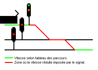 Exemple d'application d'une restriction de vitesse imposée par l'image 2 d'un signal de sortie. Le train doit respecter la vitesse de 40 km/h sur les aiguillages en position déviés puis peut reprendre sa vitesse maximale selon tableau des parcours.